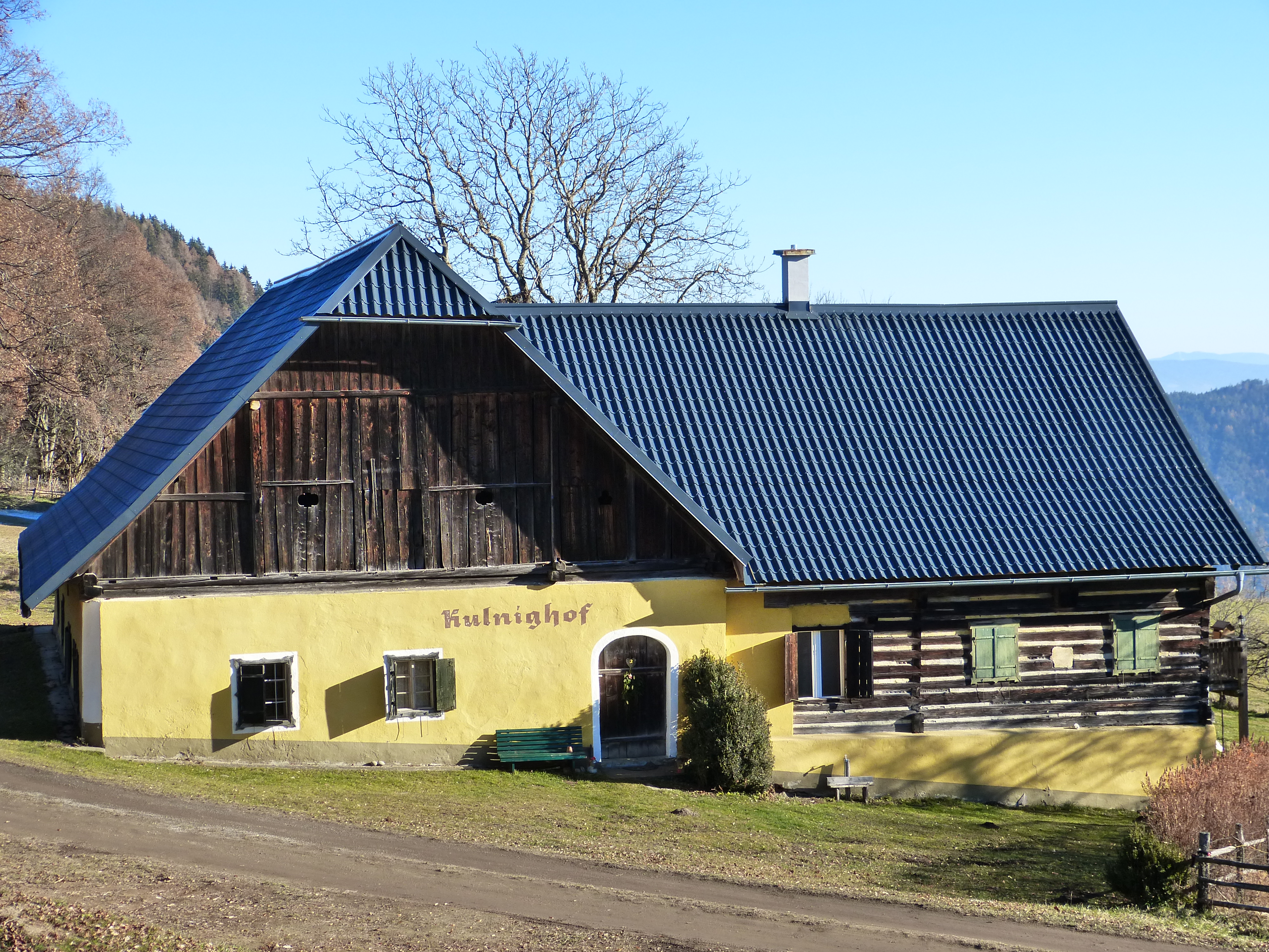 Kulnighof, Christofberg (Gemeinde Brückl, Kärnten): Bauernhaus. Im Dehio Kärnten 2001, S.66, als "für die Ausläufer der Saualpe typisches Winkelhaus" erwähnt; Längslaubenhaus. gut erhaltener Bauernhof; Das Dach wurde 2015 nach einem starken Hagelunwetter renovierte.